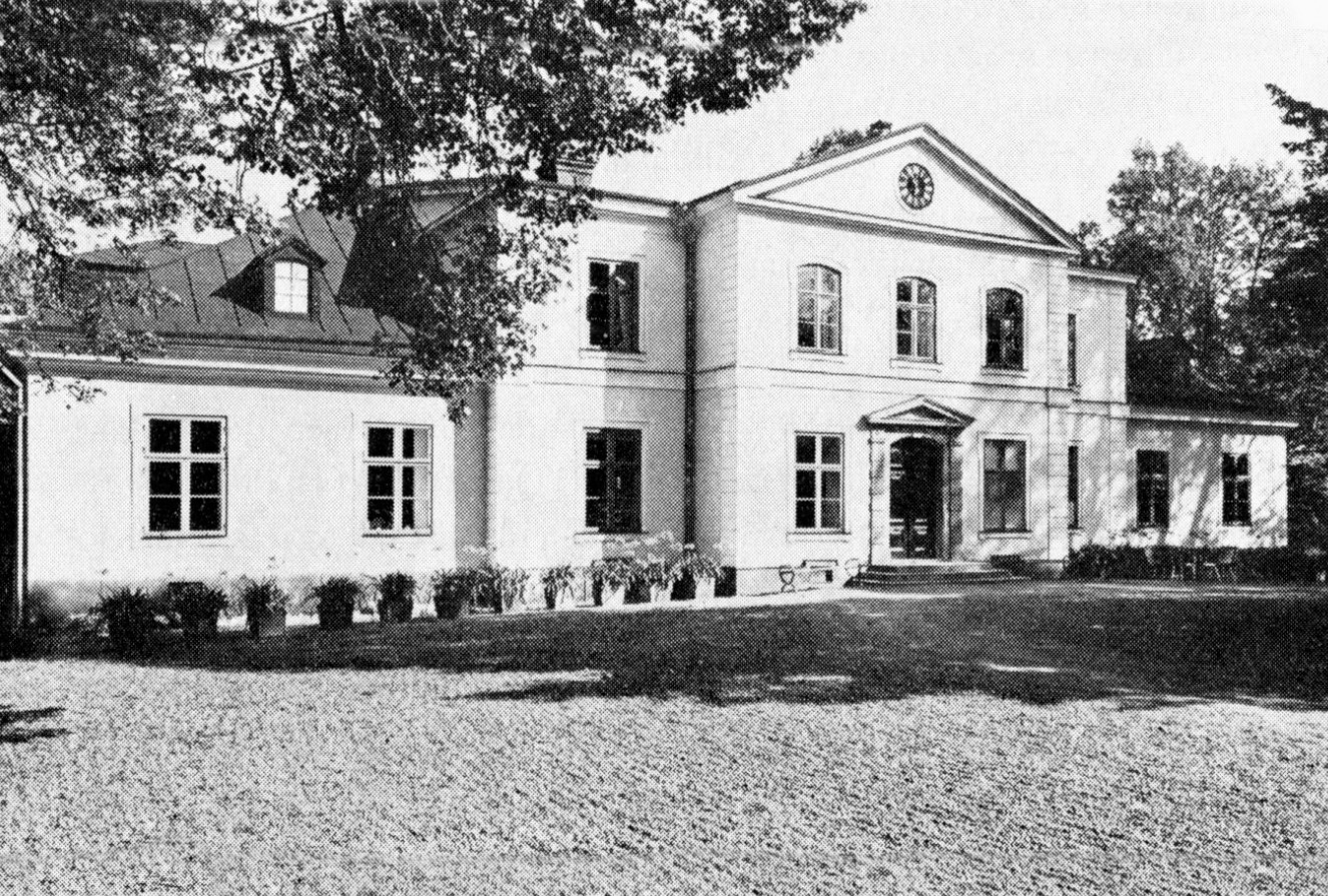 Högsjögård, Vingåker (huvudbyggnad)